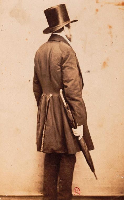 Charles-Valentin Alkan, standing